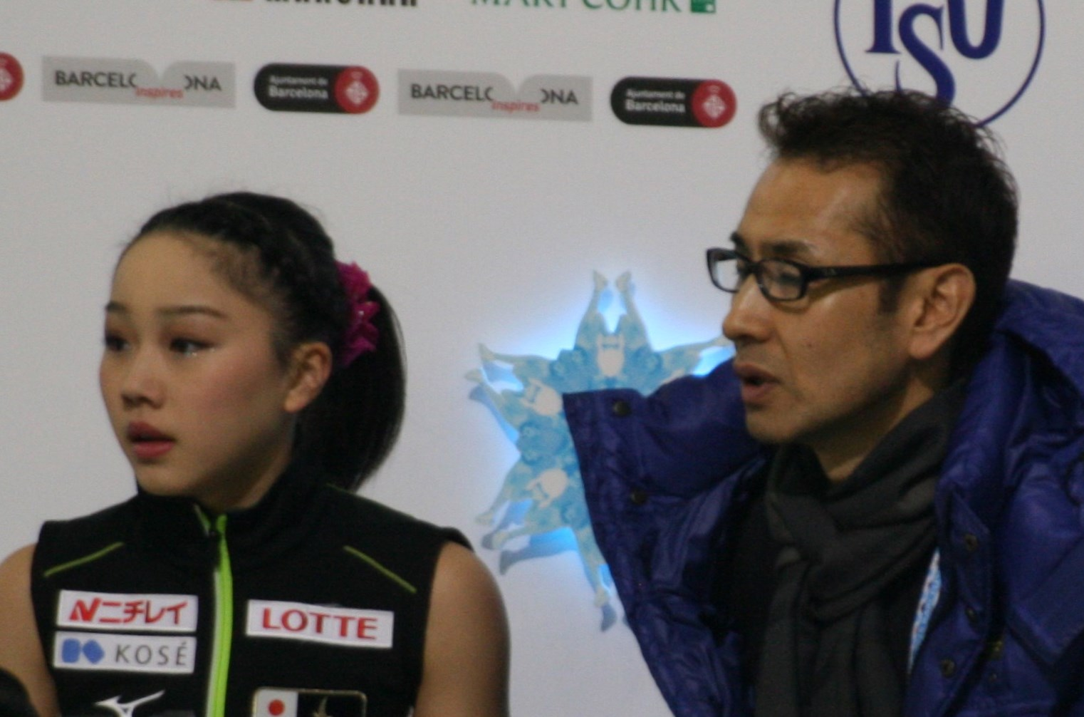 Вакаба Хигучи (Япония) со своим тренером Koji Okajima на финале Гран-при среди юниоров 2014-2015.